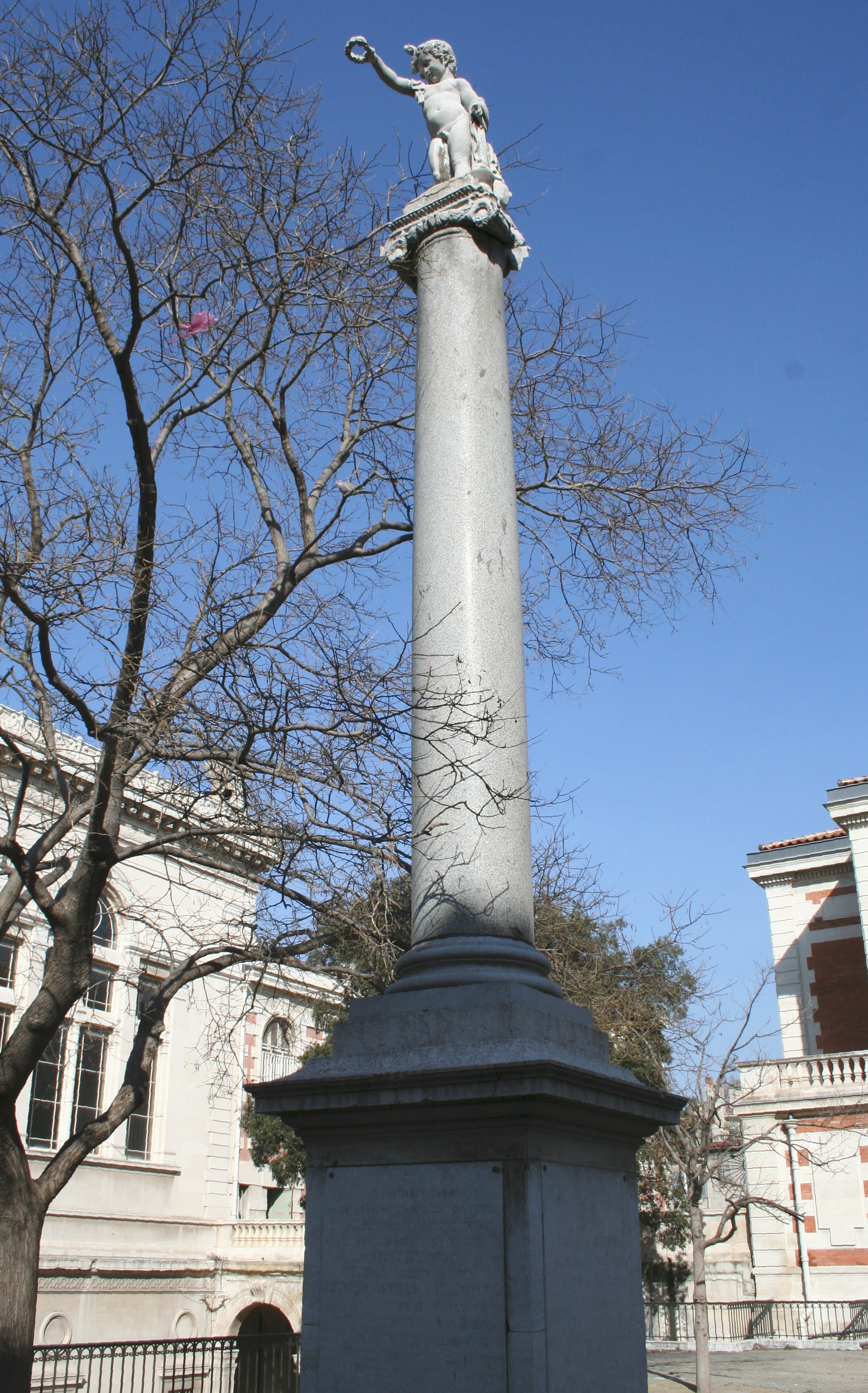 Colonne dédiée à la mémoire de la peste qui a eu lieu à Marseille en 1720.